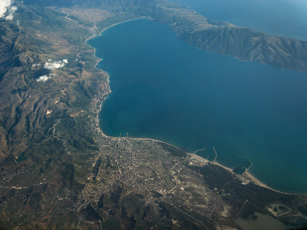 Vlora von oben, Albanien 2014